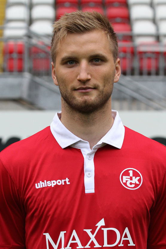 Kacper Przybylko